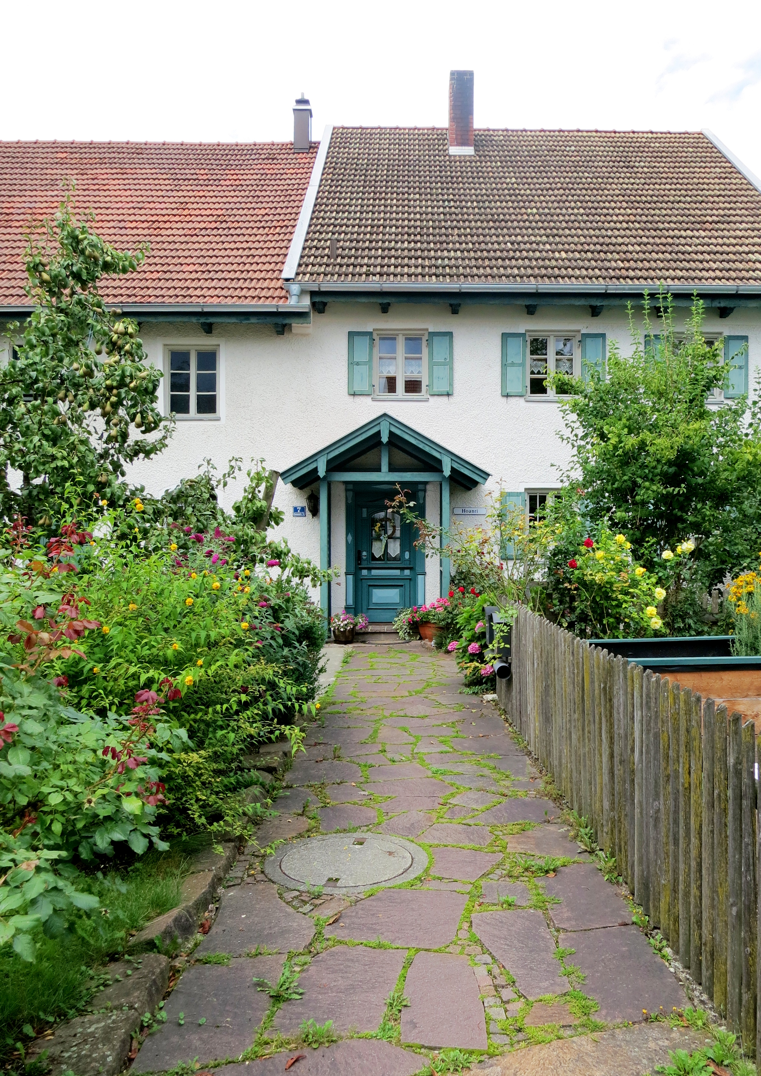 Ehemaliges Bauernhaus Mammendorfer Straße 7 in Jesenwang - Zugangsweg mit Vorgarten und Türe